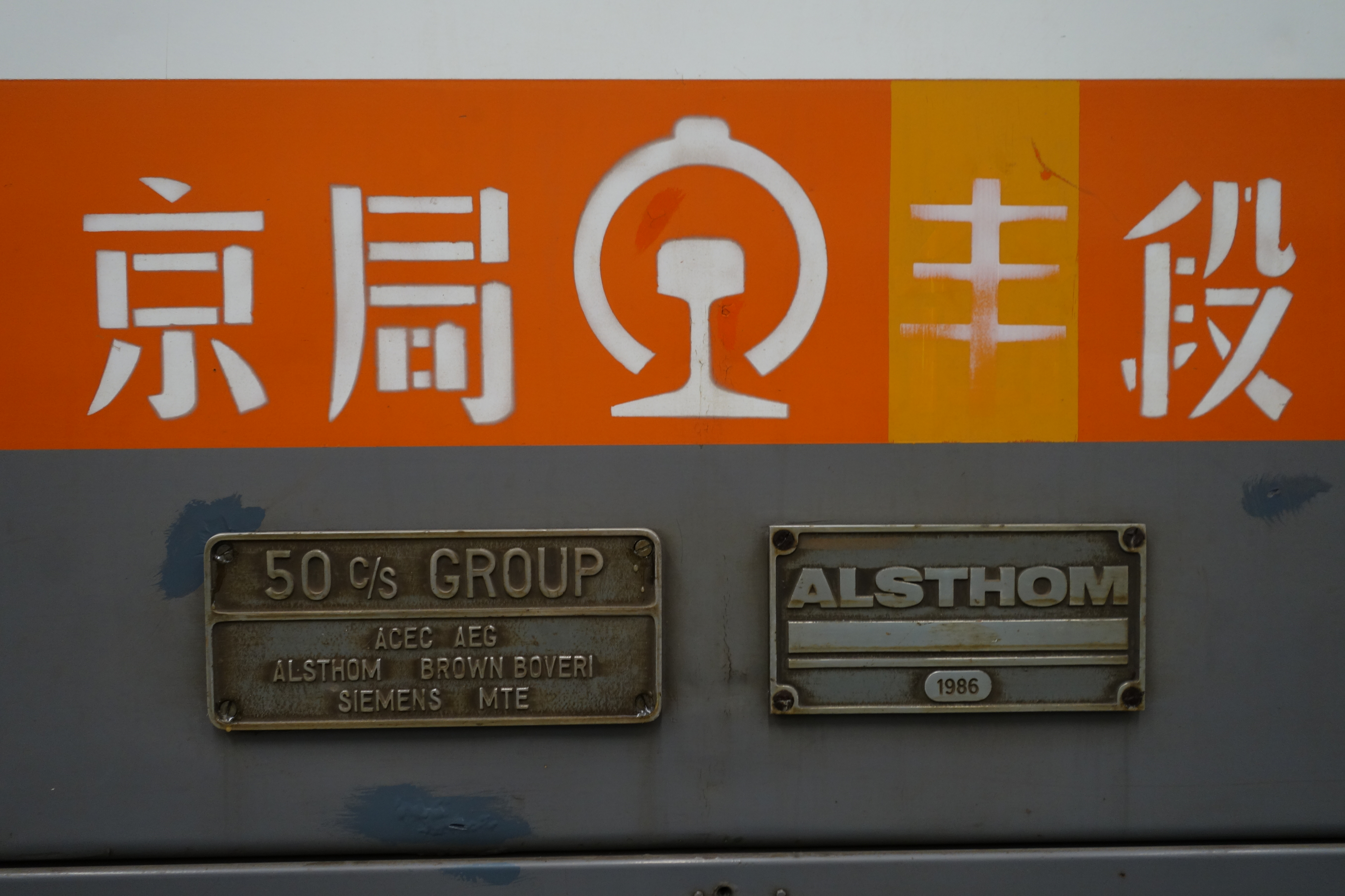 中国铁道博物馆保存8K-008电力机车